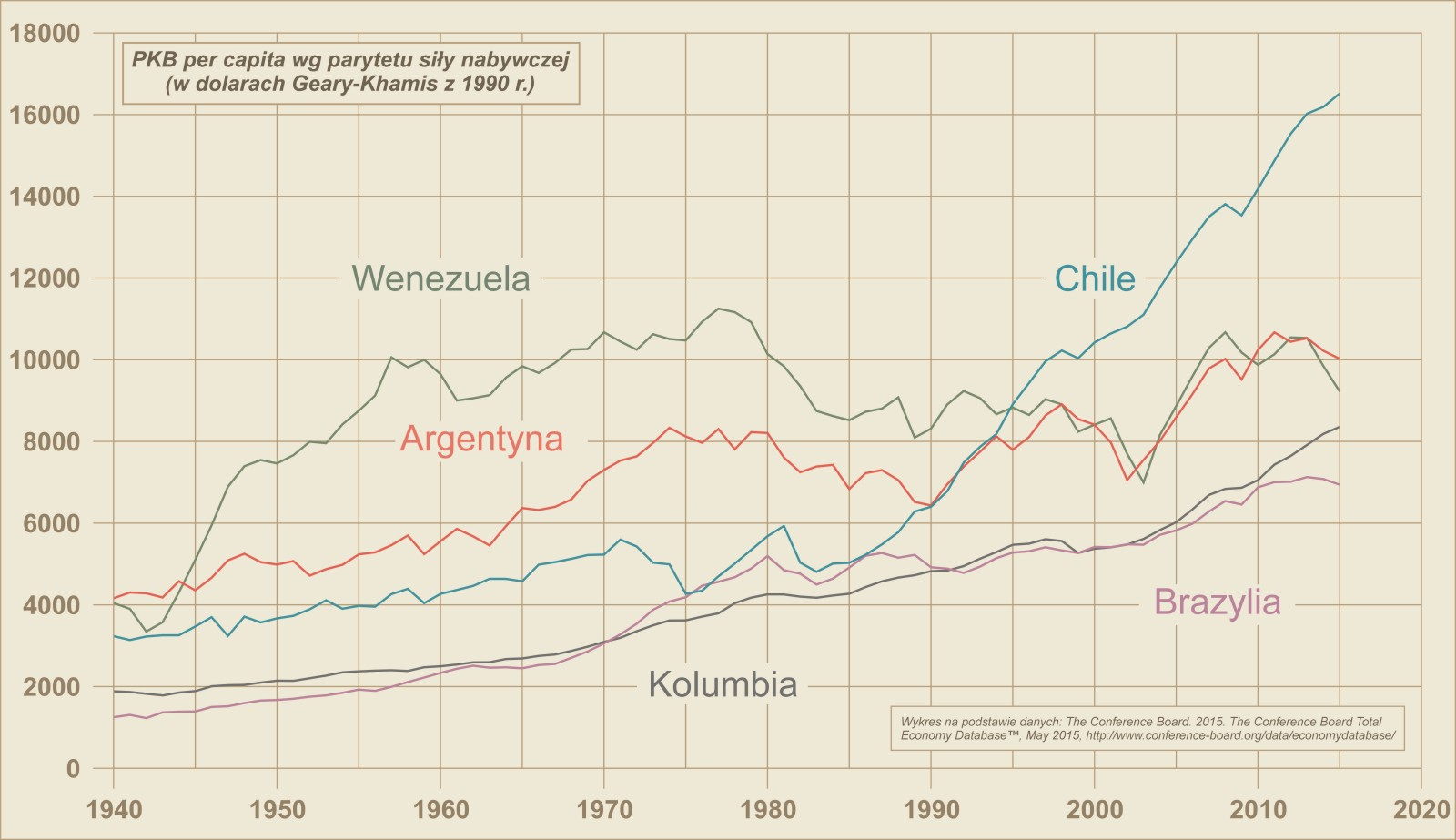 PKB per capita wg parytetu siły nabywczej pięciu największych gospodarek Ameryki Południowej (w dolarach Geary-Khamis z 1990 r.). Wykres na podstawie danych: 1.The Conference Board Total Economy Database™, May 2015, 2.Angus Maddison - "Statistics on World Population, GDP and Per Capita GDP, 1-2008 AD"